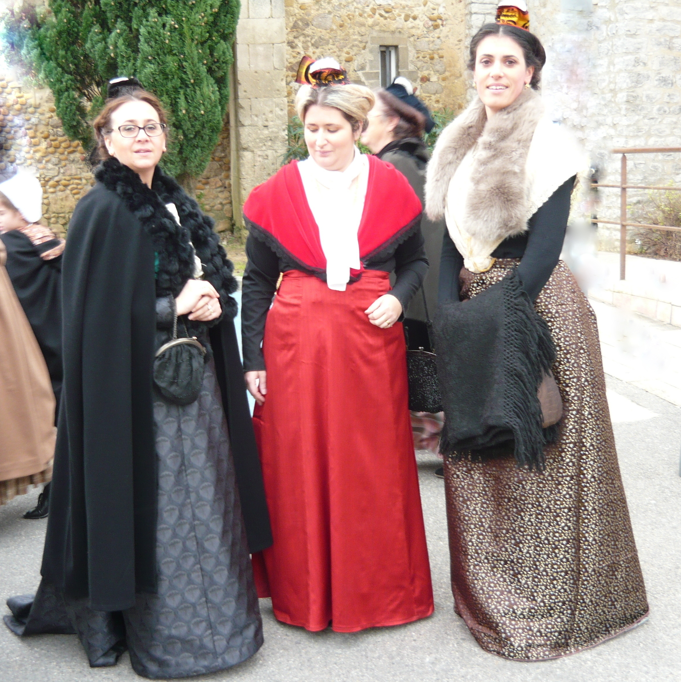 Arlésiennes en habits traditionnels lors de la fête des bergers